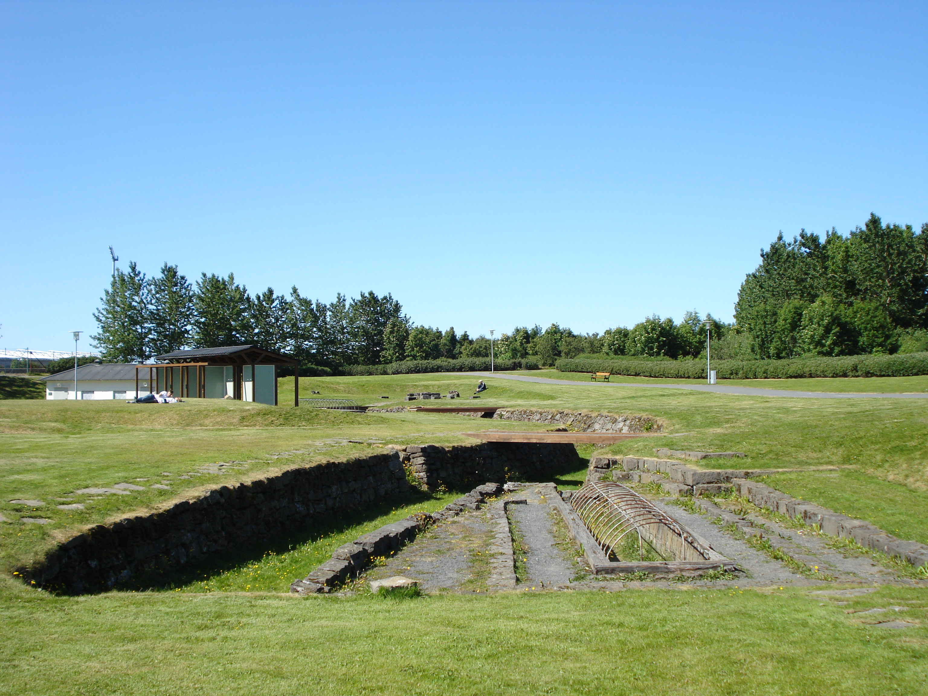 Þvóttalaugar in Laugardal, Reykjavik, Iceland